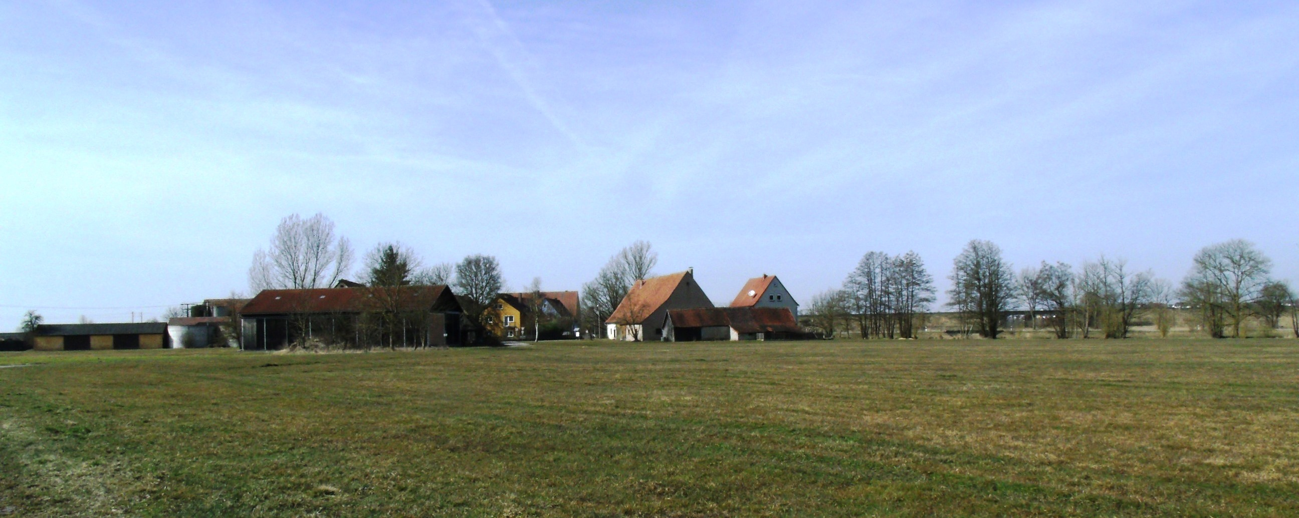 Görchsheim, Ortsteil von Leutershausen im mittelfränkischen Landkreis Amsnach